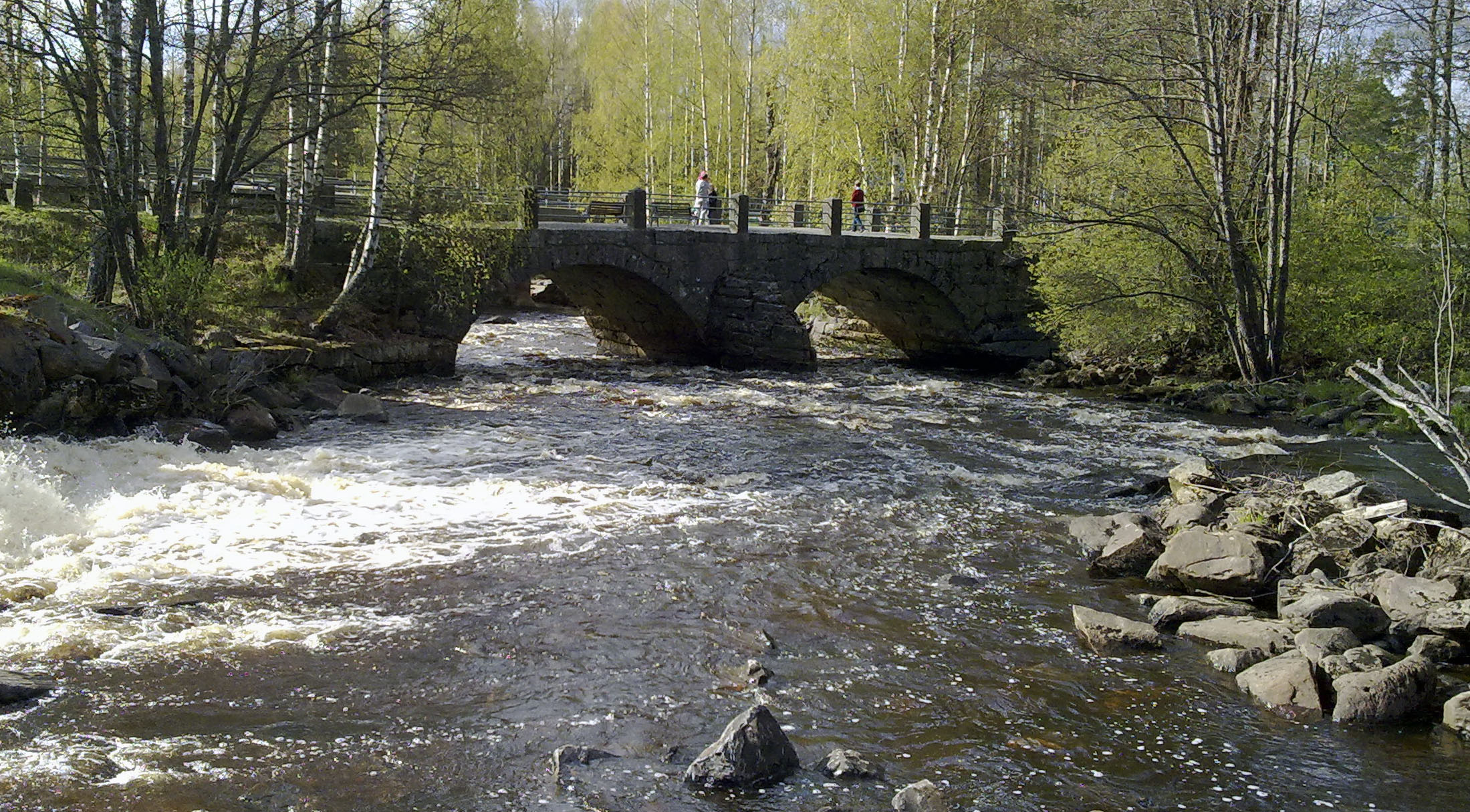 Lankosken historiallinen silta.